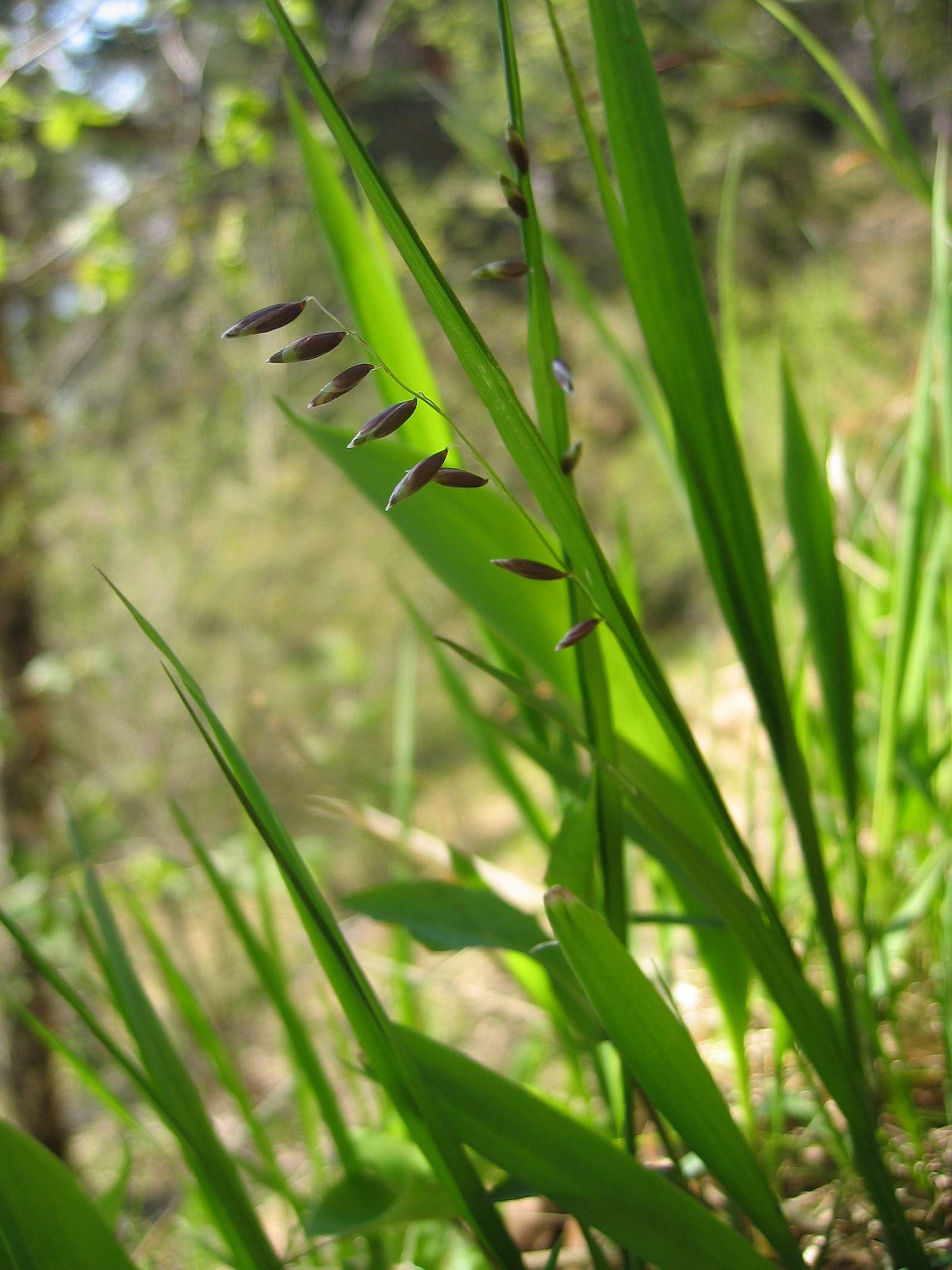 Melica nutans Kaltenbachwildnis, Upper Austria, Austria